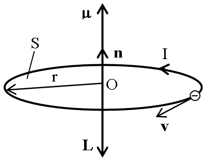 Диполен момент mu и момент на импулса L на електрон движещ се по окръжност с радиус r; © 2007 Милко Куйлеков